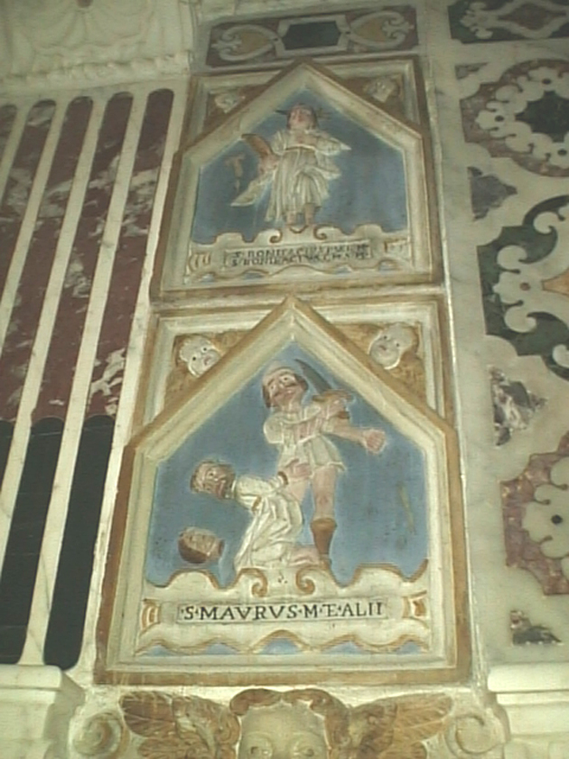 Santuario dei Martiri - Cagliari